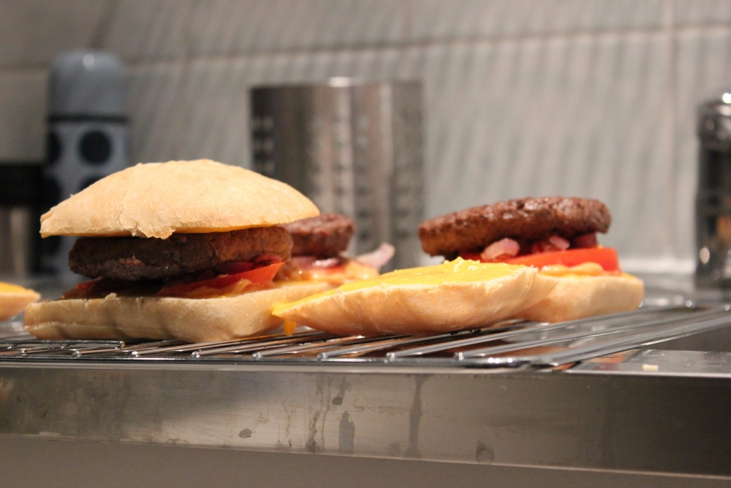 Yaoundé, Cameroun This is an image of food from Cameroon